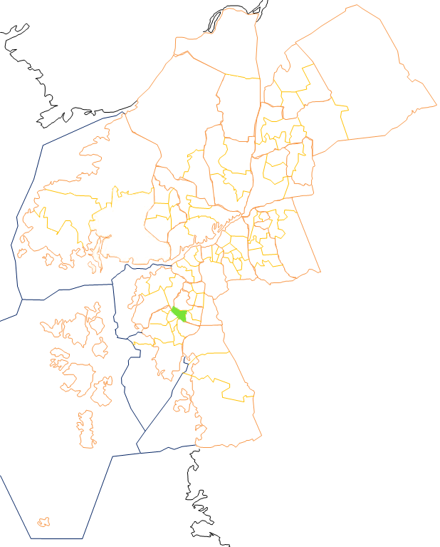 Karta som visar primärområdes belägenhet i Göteborg